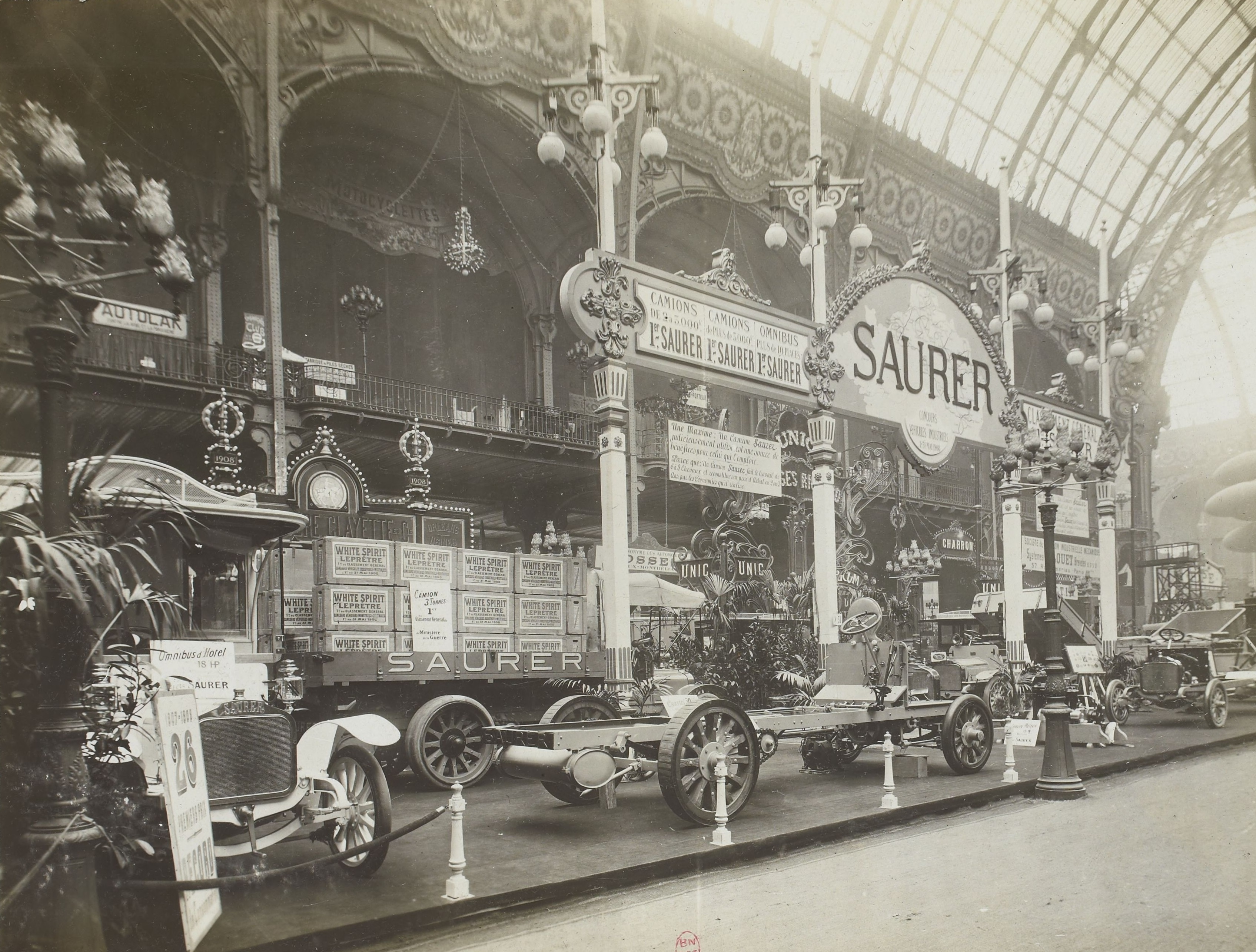 [Collection Jules Beau. Photographie sportive] : T. 35. Années 1908, 1909 et 1910 / Jules Beau